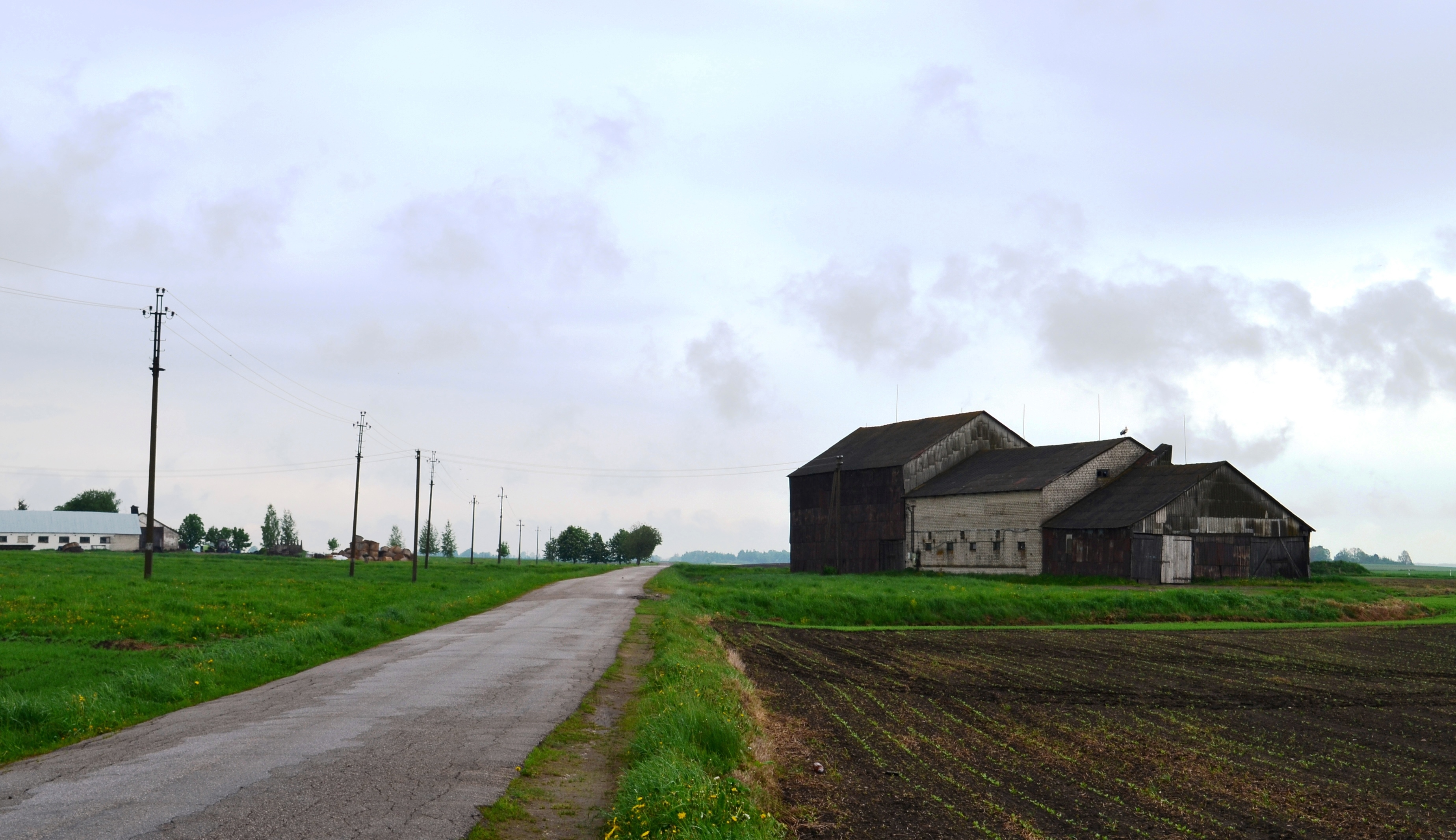 Fermos, Blandžiai, Kėdainių raj.